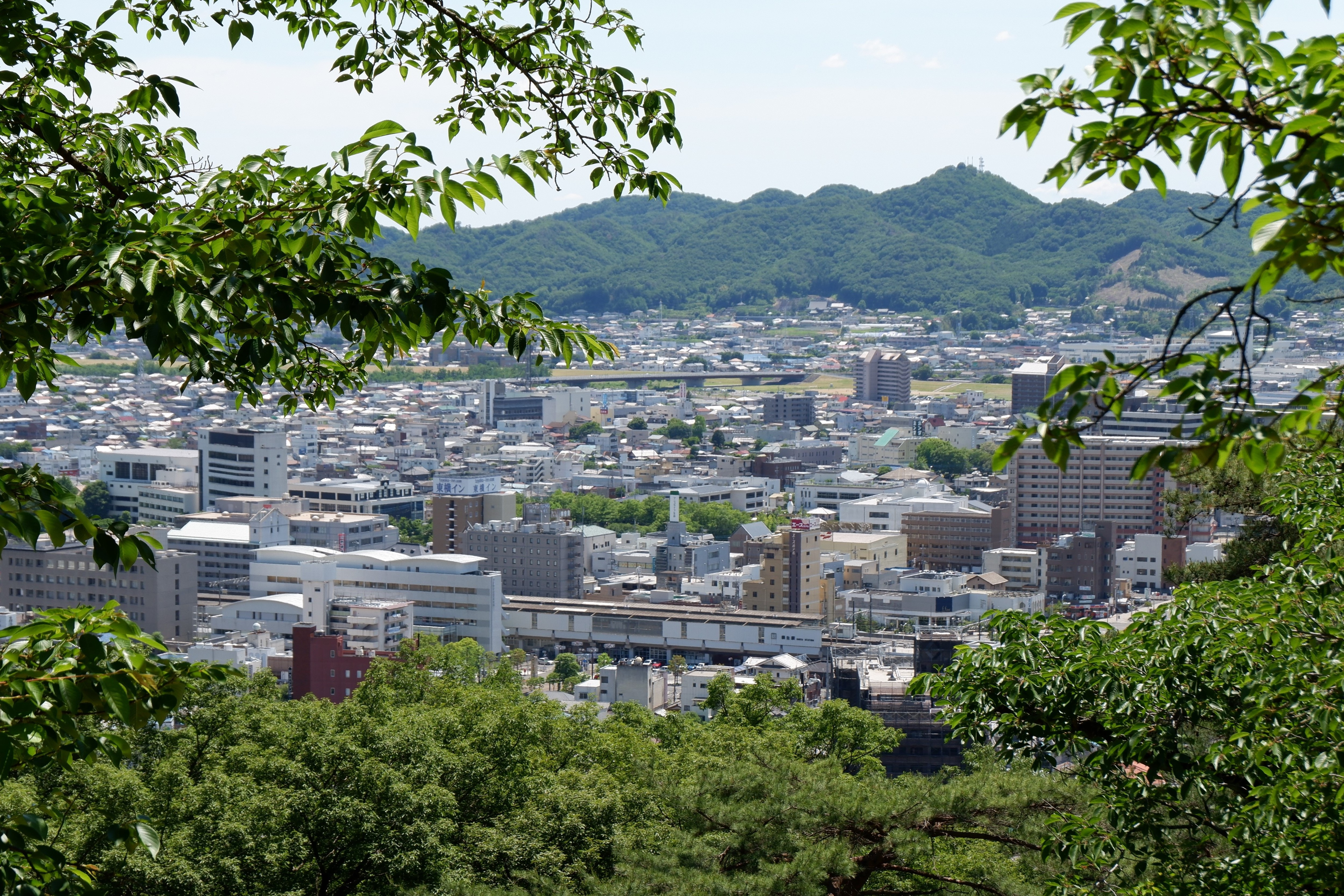 水道山から望む桐生市街地と茶臼山